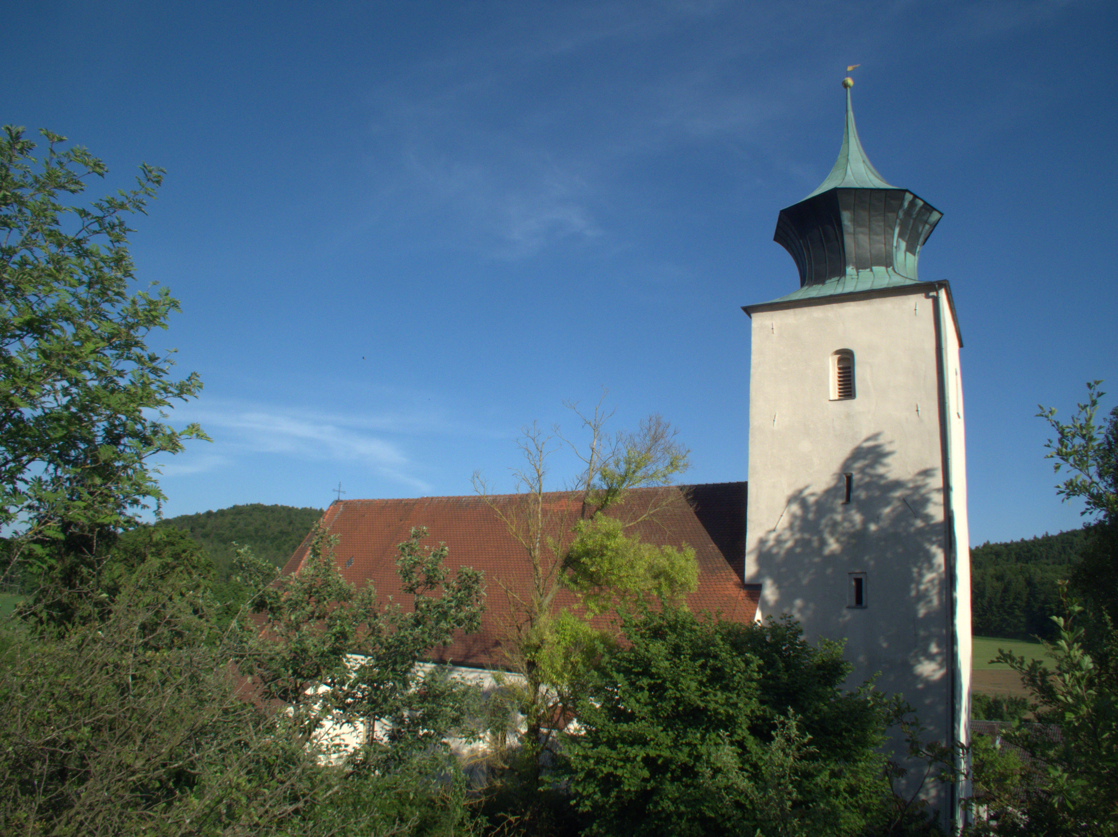 Wallfahrtskirche St. Wolfgang bei Velburg, Oberpfalz: Kirche von aussen